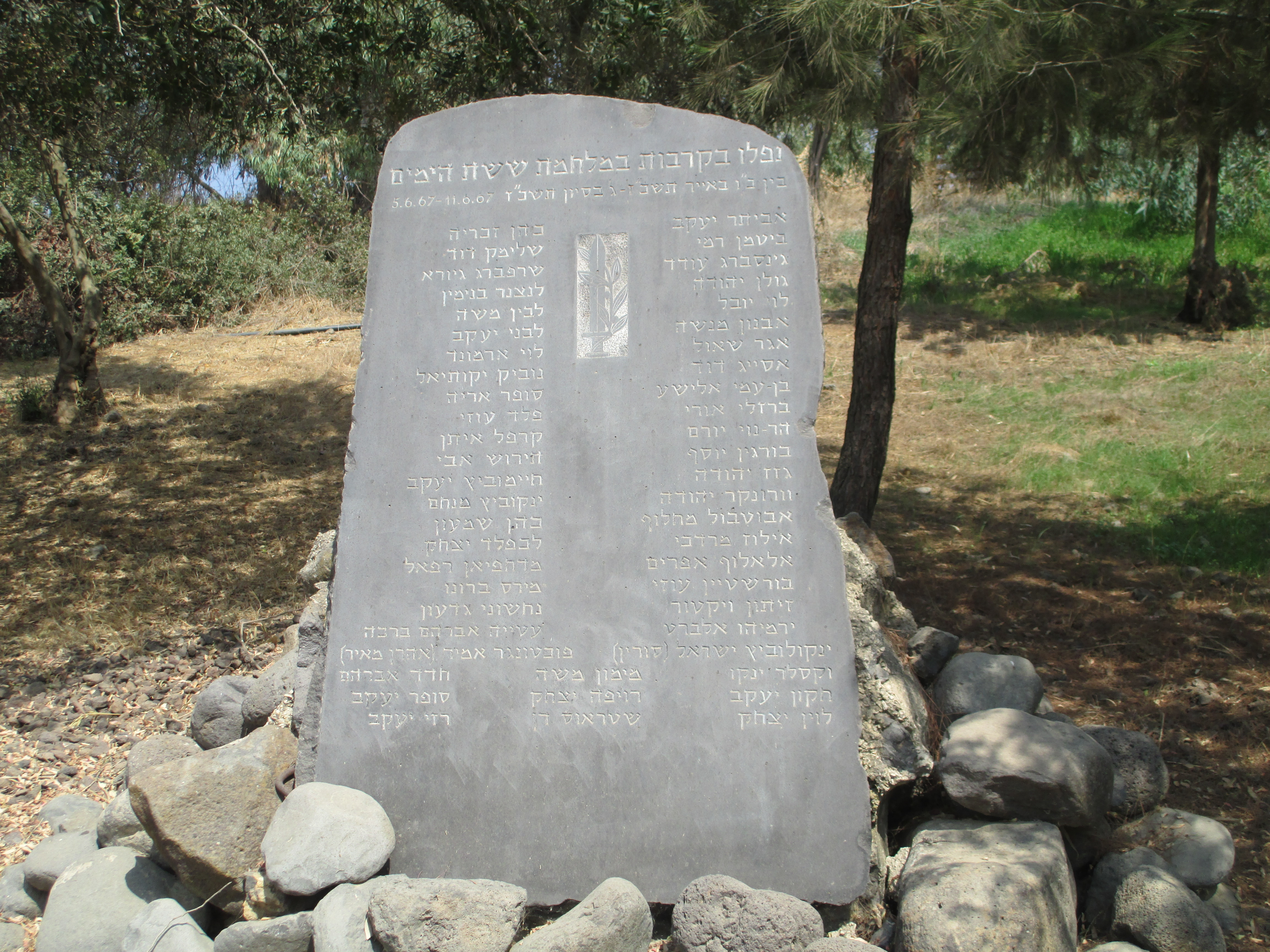 אנדרטת הזיכרון המרכזית של חטיבת ברק ברמת הגולן